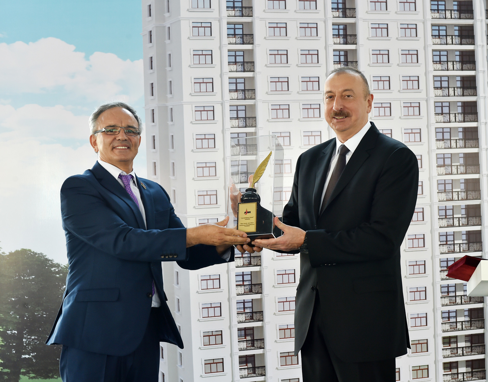 İlham Əliyev jurnalistlər üçün tikilmiş binada mənzillərin paylanması mərasimində (2017)